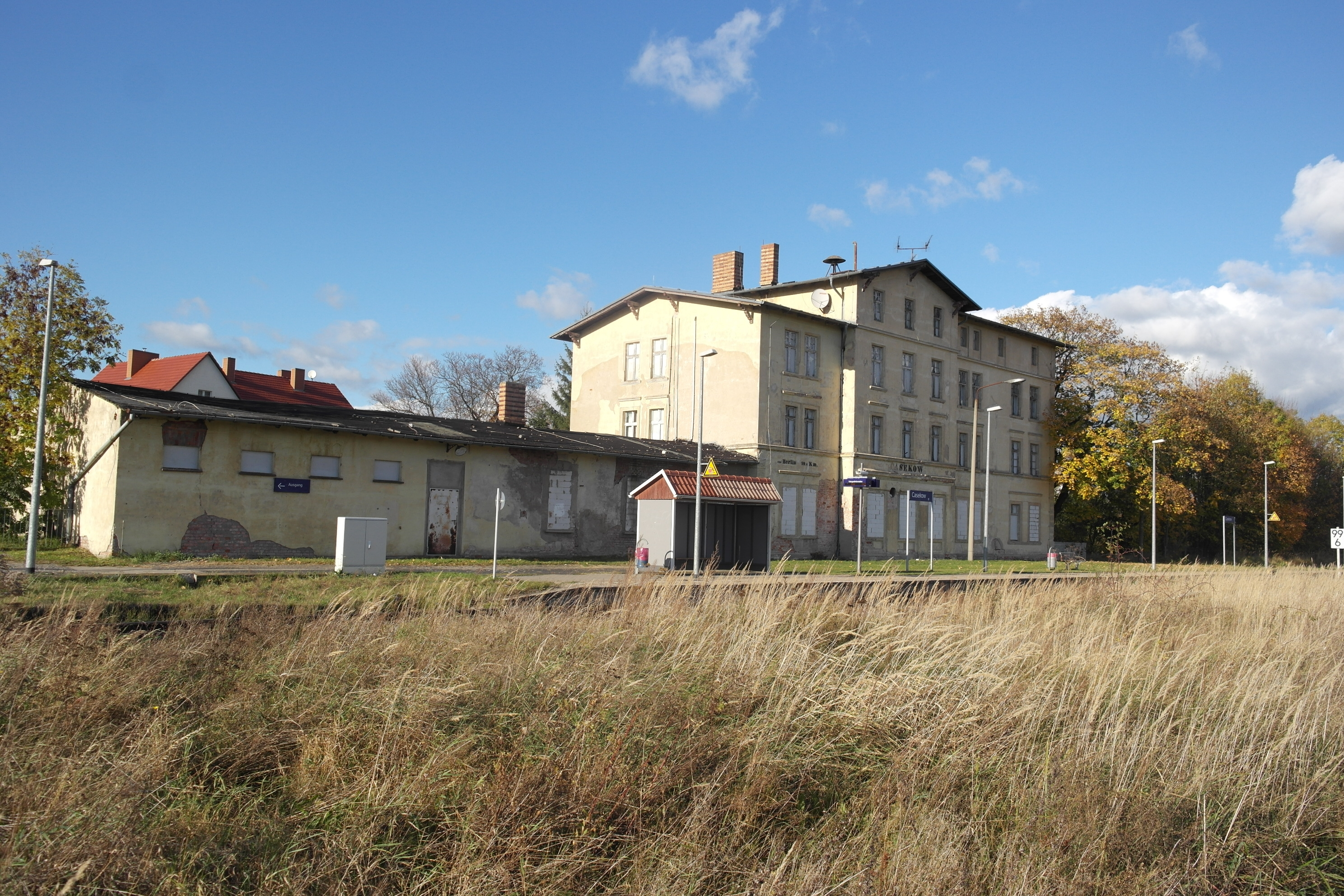 Bahnhof Casekow, denkmalgeschütztes Gebäude und Bahnsteig